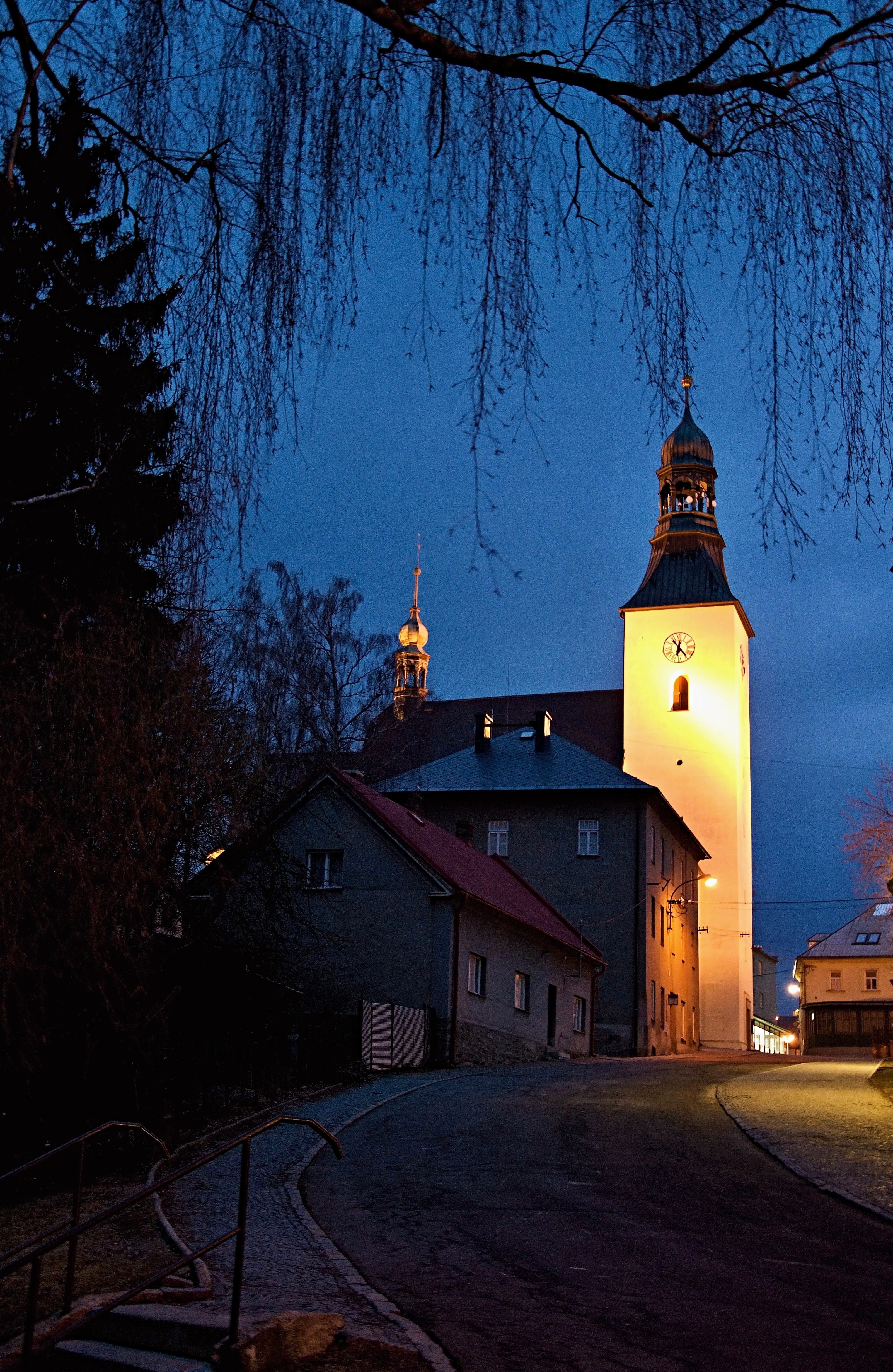 Ulice Národní, kostel sv. Archanděla Michaela v Rýmařově